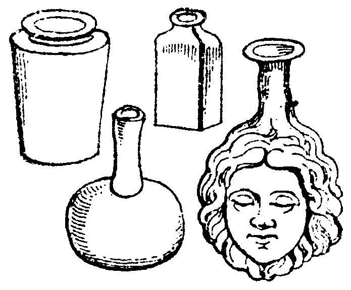 Ampulla.